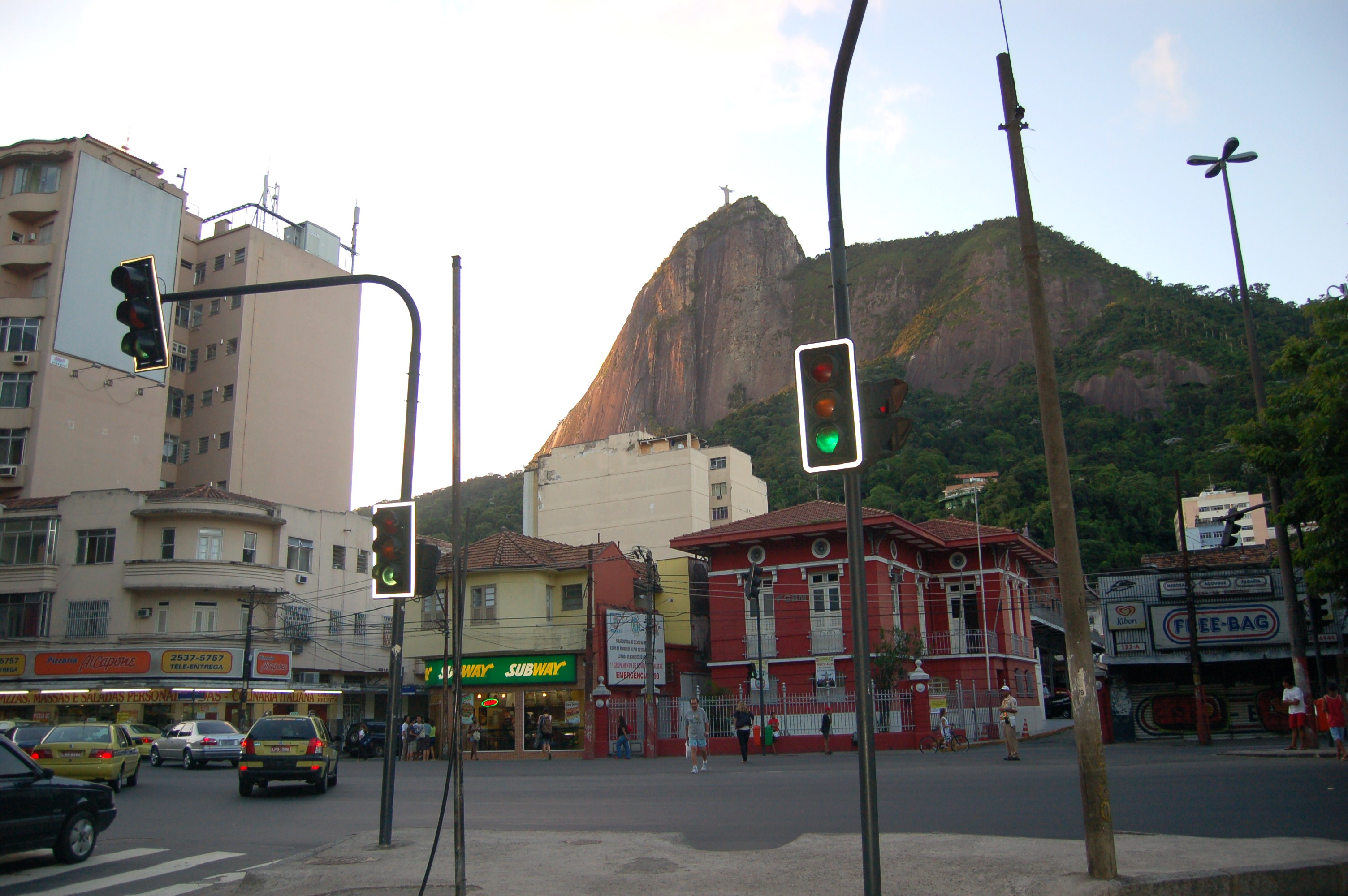 Humaitá - Suvaco do Cristo Redentor